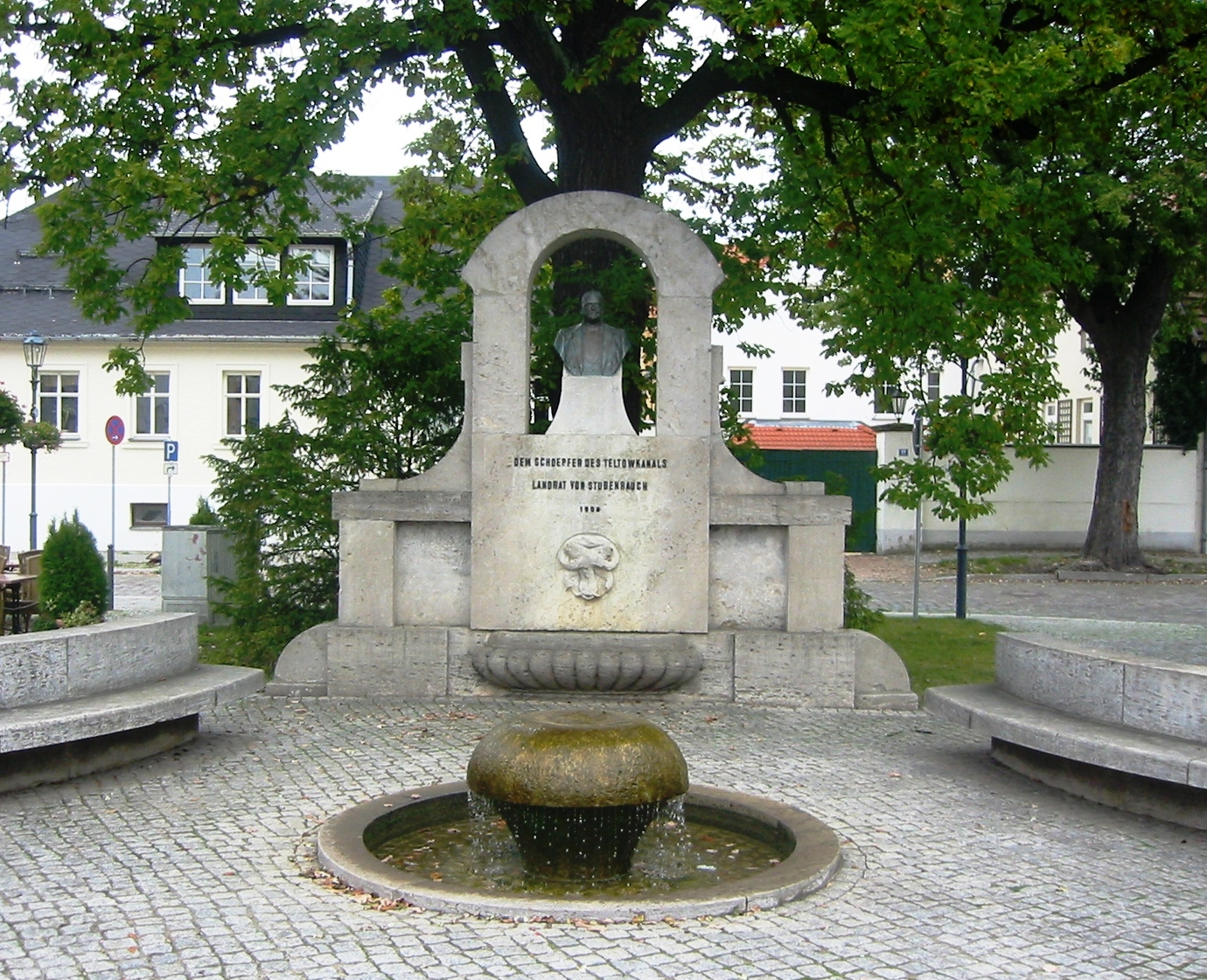 Stubenrauchdenkmal in Teltow (Fläming)